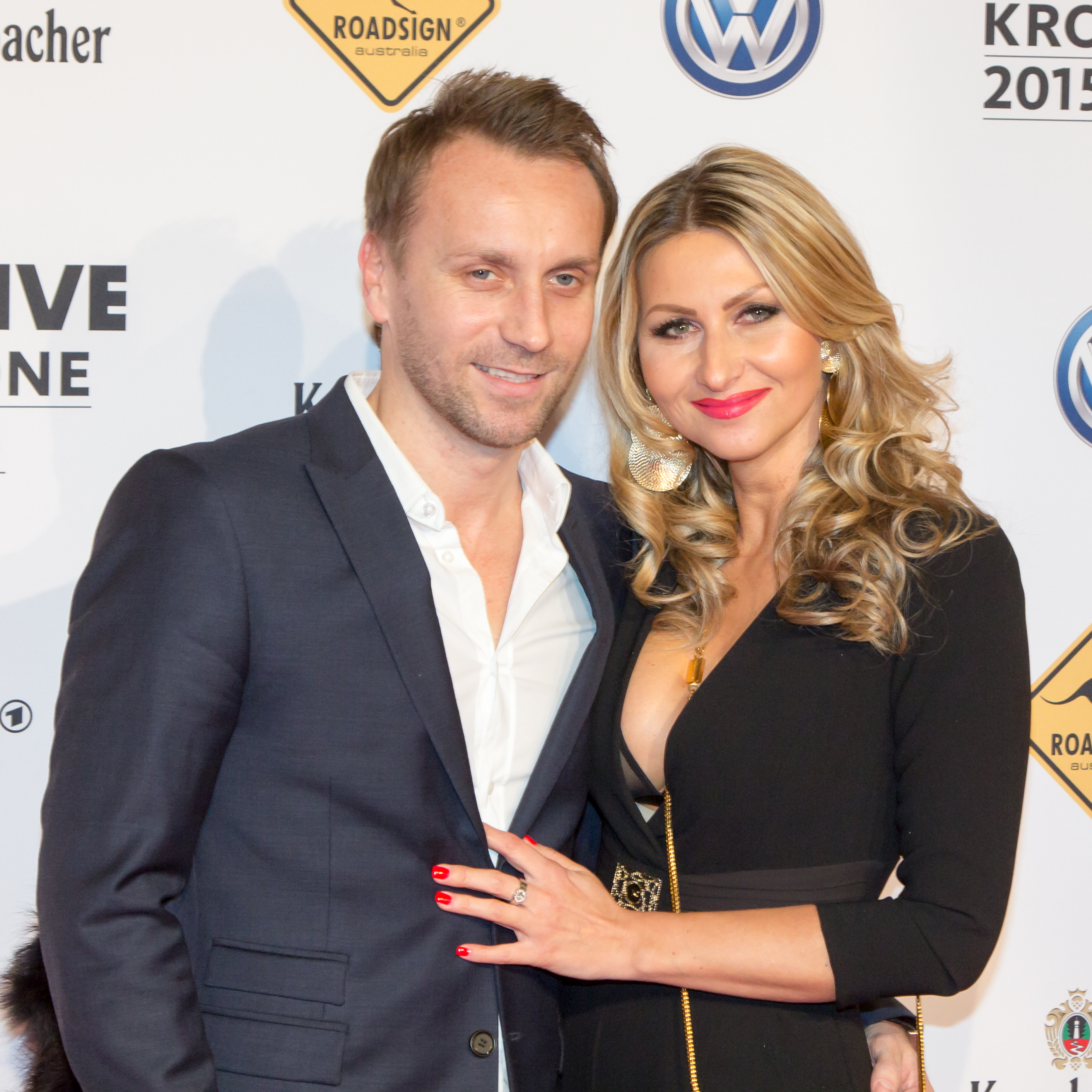 1LIVE Krone 2015: Sebastian Schindzielorz (l) mit Ehefrau Evelina unknown